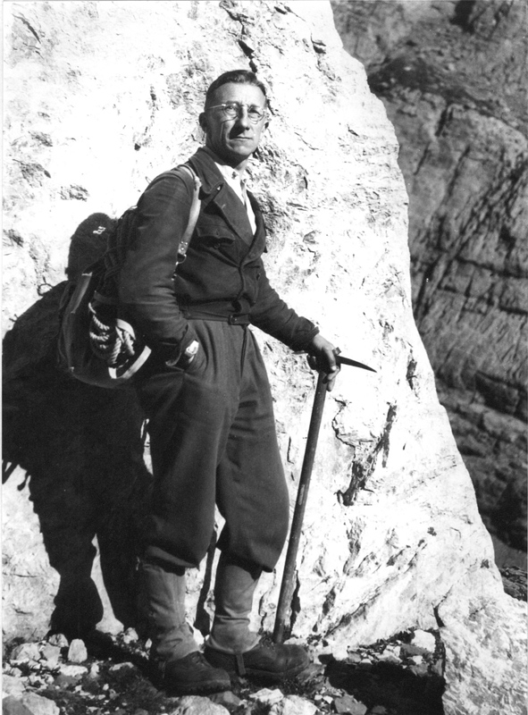 Norbert Casteret devant un gouffre.